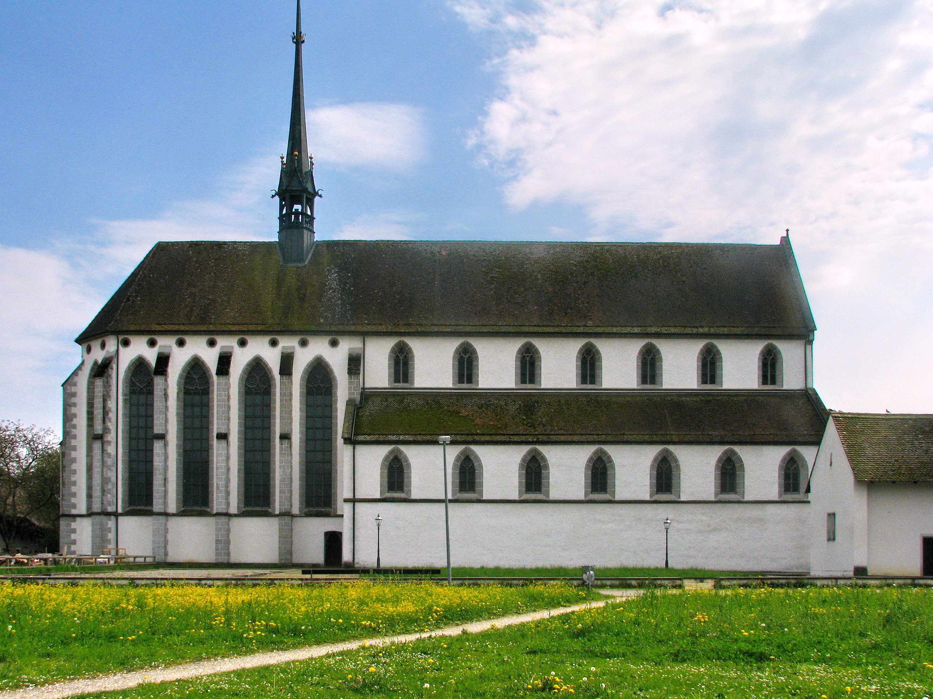 Königsfelden in Windisch (Switzerland)